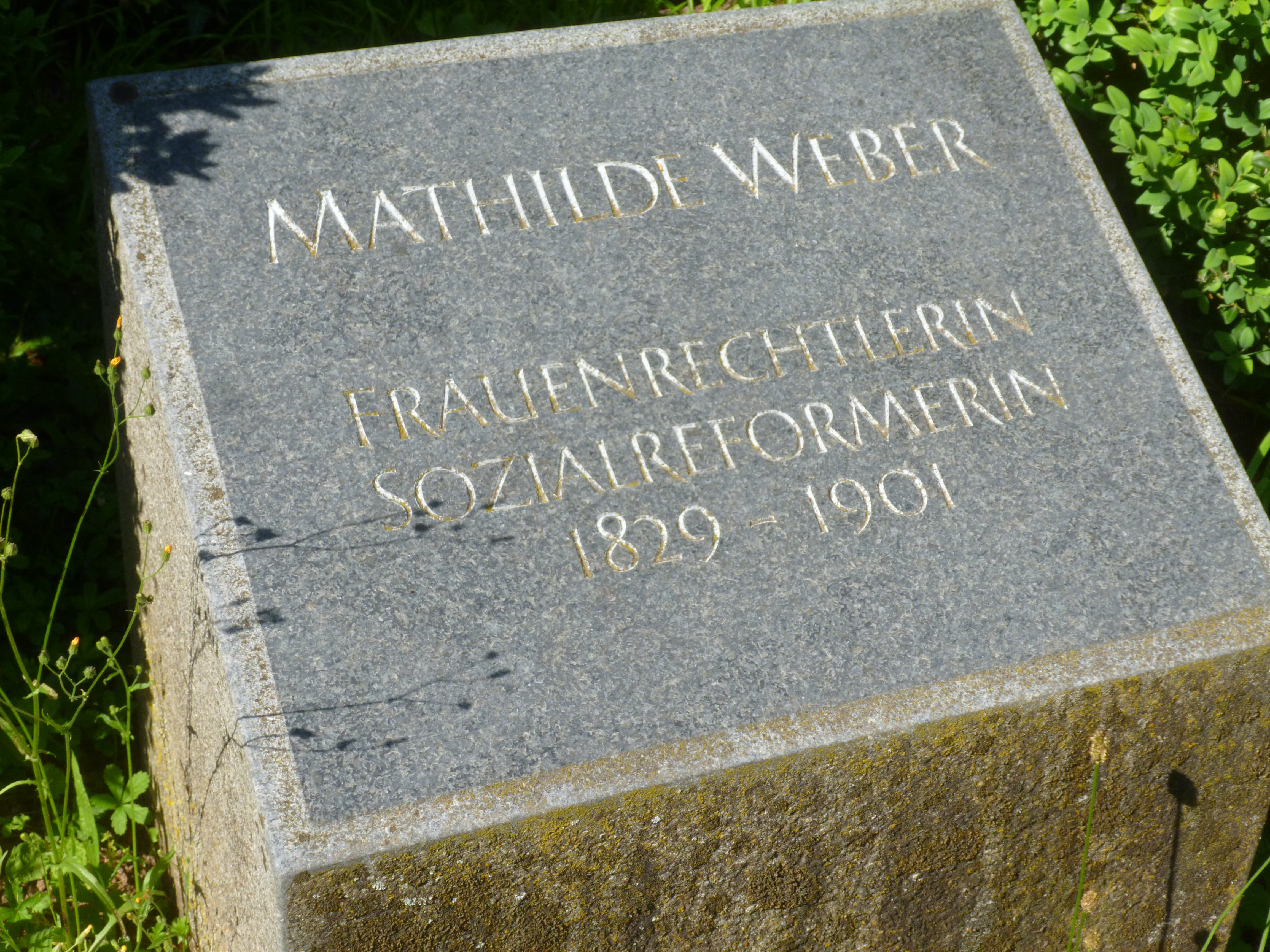 Ersatzgrabsteon Mathilde Webers auf dem Stadtfriedhof Tübingen